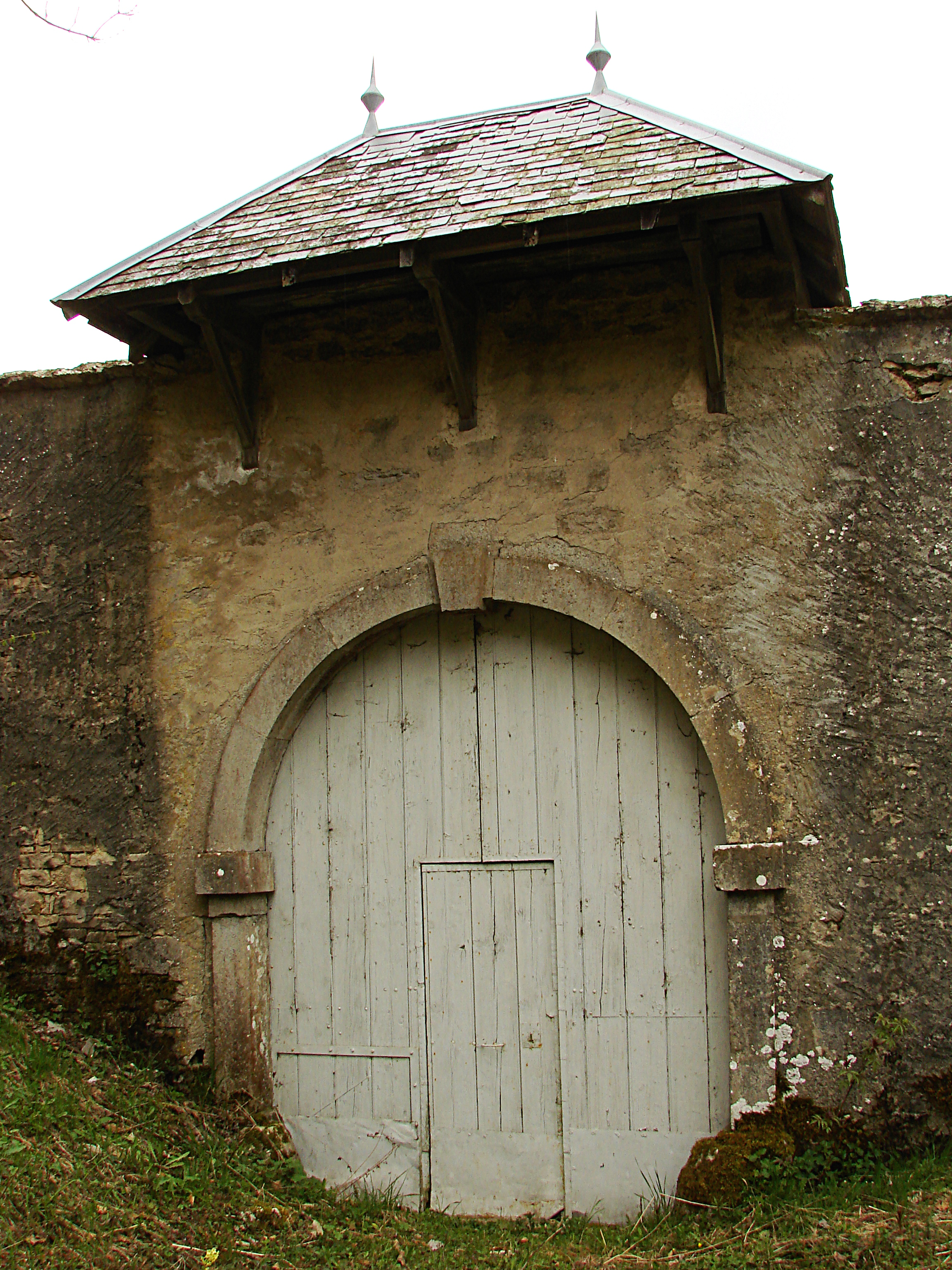 Un des portails de la Chartreuse de Portes